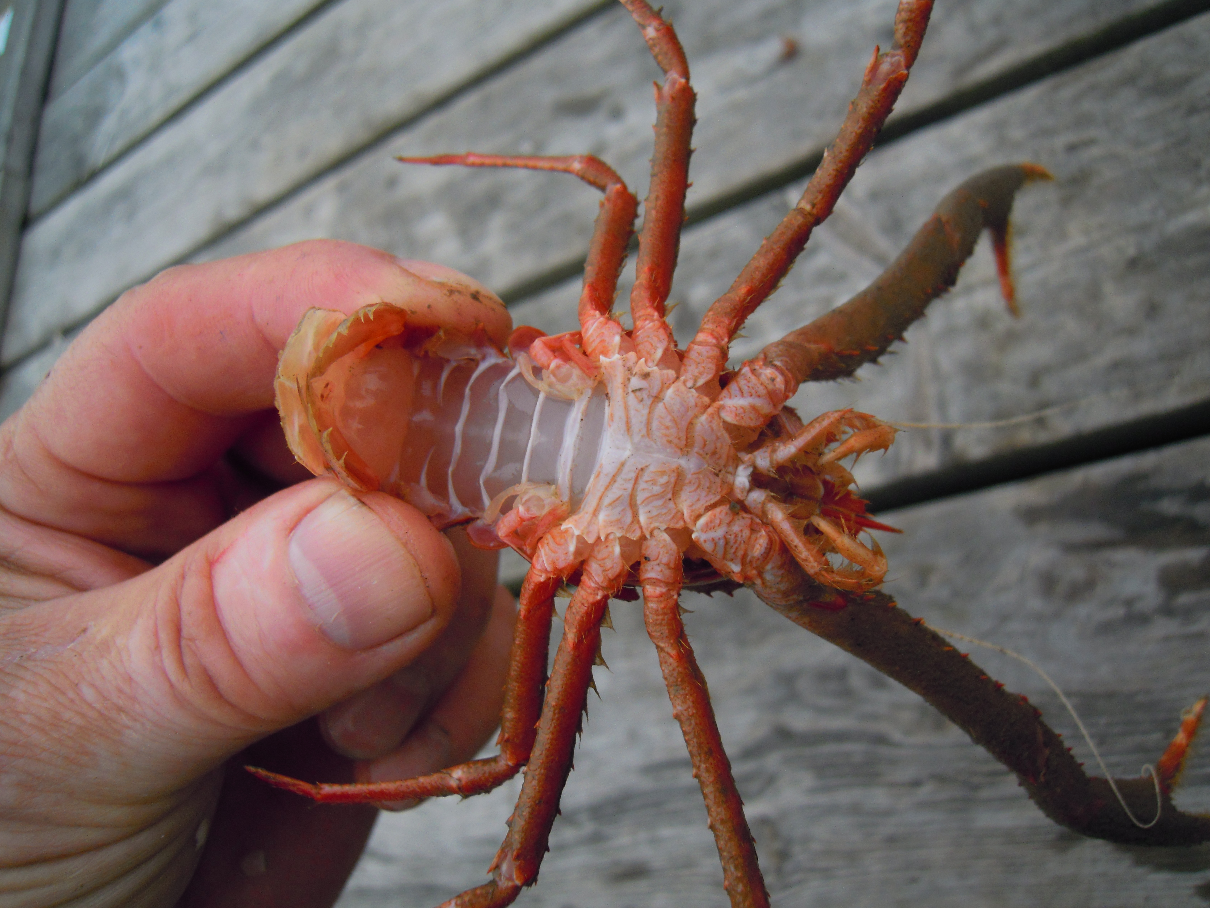 Langfingerkreps - Munida rugosa, Stavern. You are free to use this picture outside Wikipedia (see license), as long as you write: Photo: Arnstein Rønning